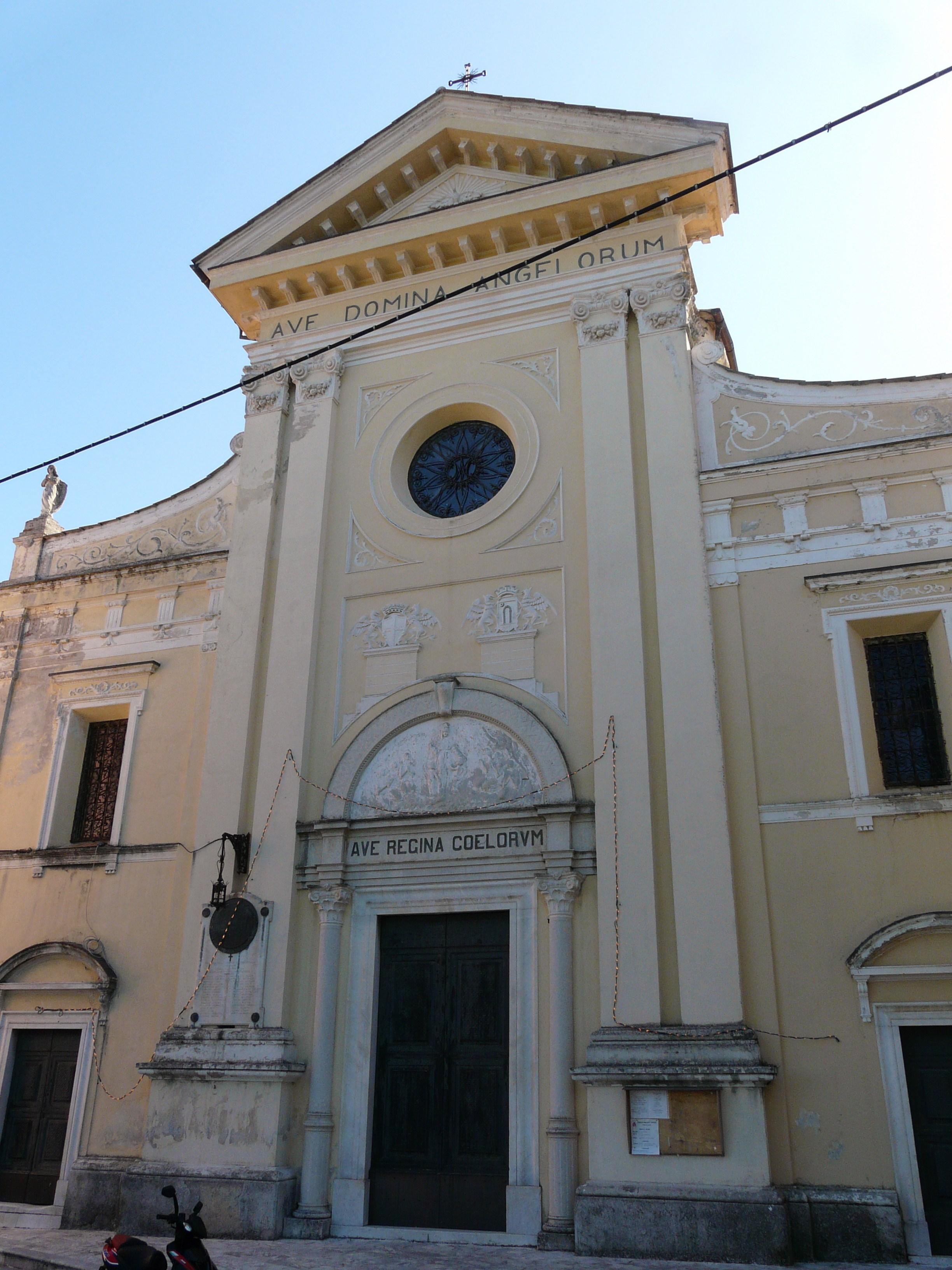 Santuario di Nostra Signora degli Angeli, Arcola, Liguria, Italia